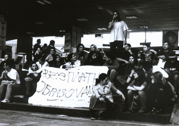 Protest za besplatno obrazovanje na platou ispred Filozofskog fakulteta, Beograd 2003.